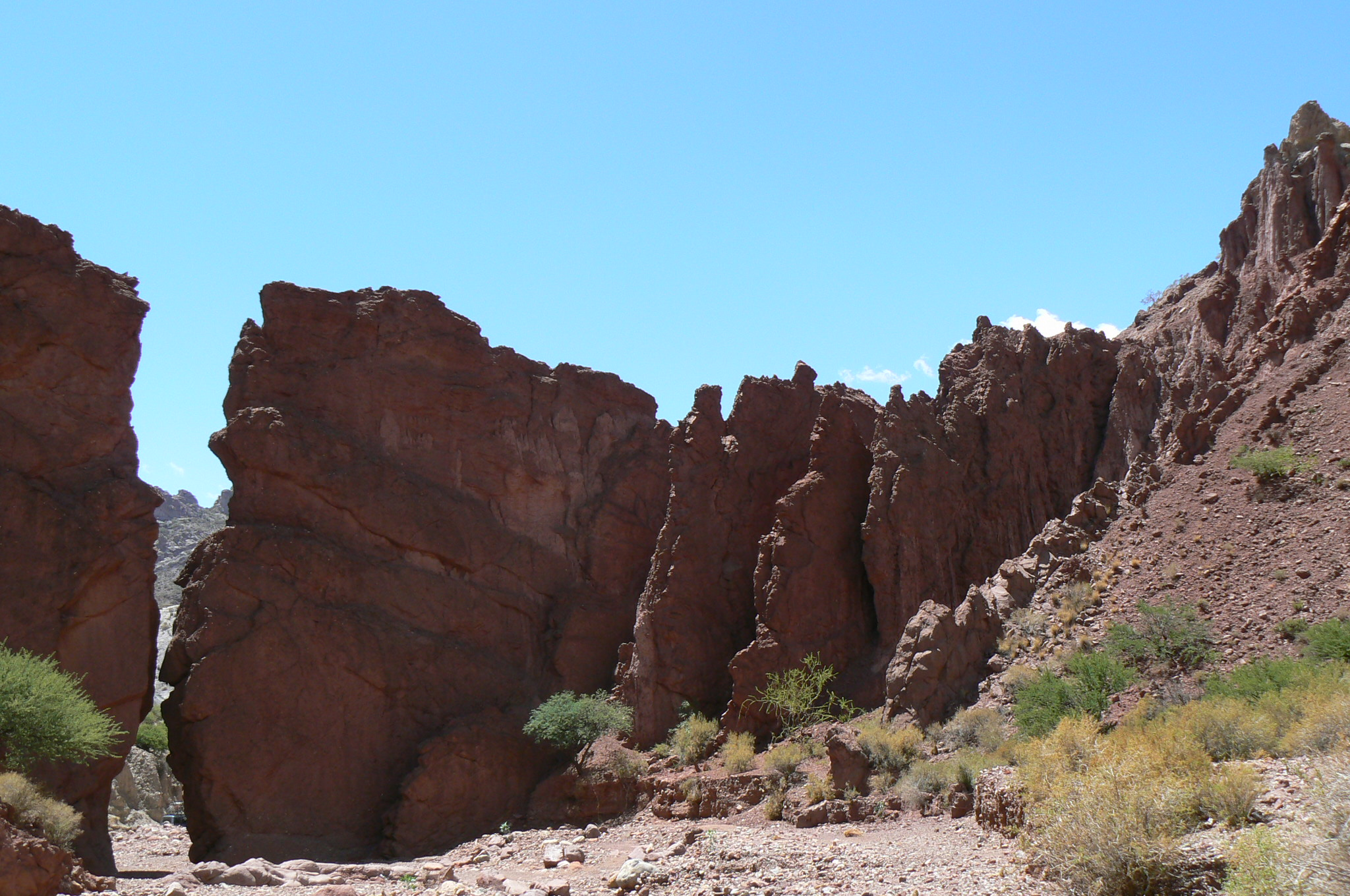 Runa Simi: Anchanchu Wayq'u, P'utuqsi suyu.